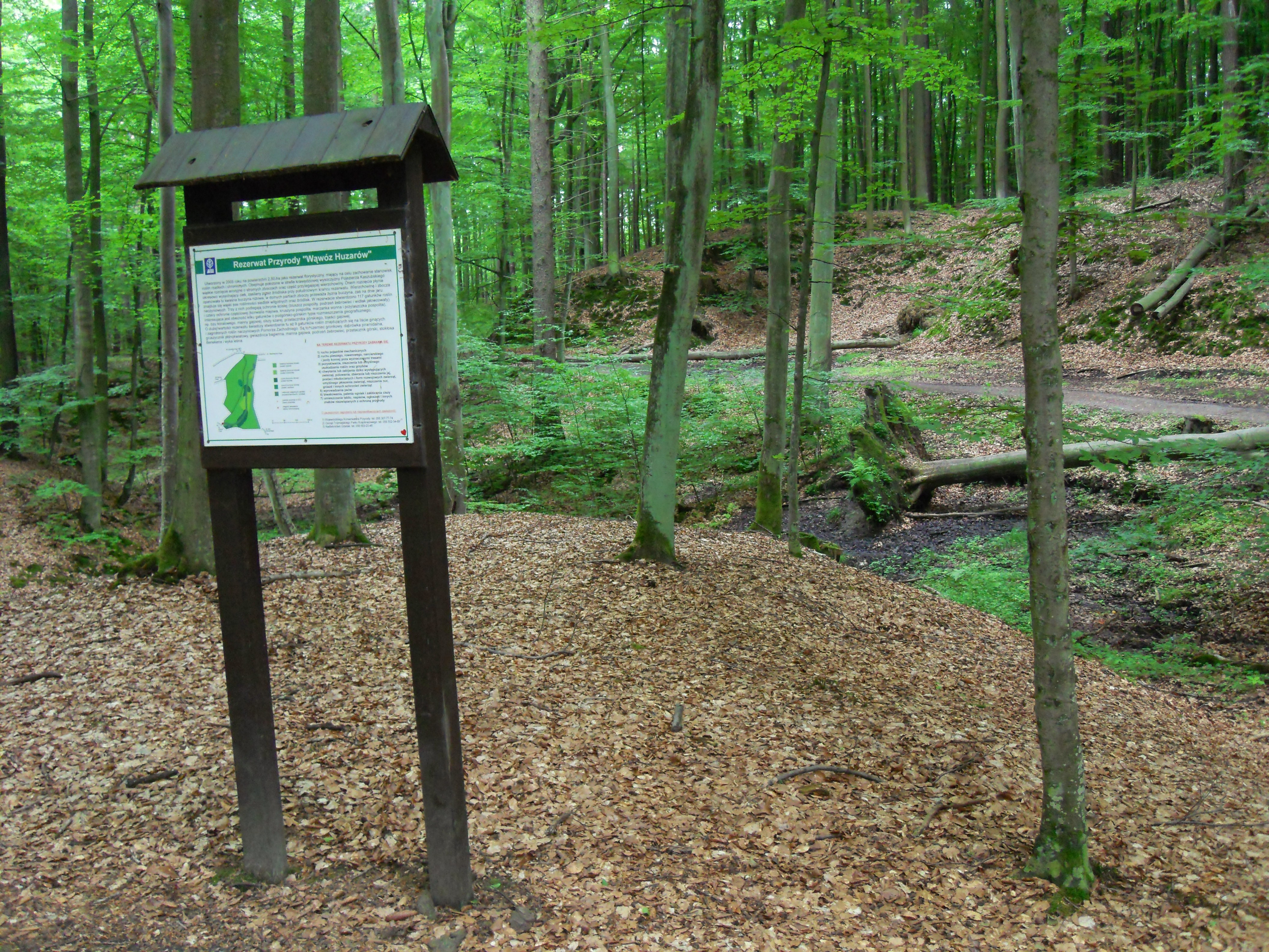 Gdańsk Brętowo - TPK Lasy Oliwskie, rezerwat "Wąwóz Huzarów"